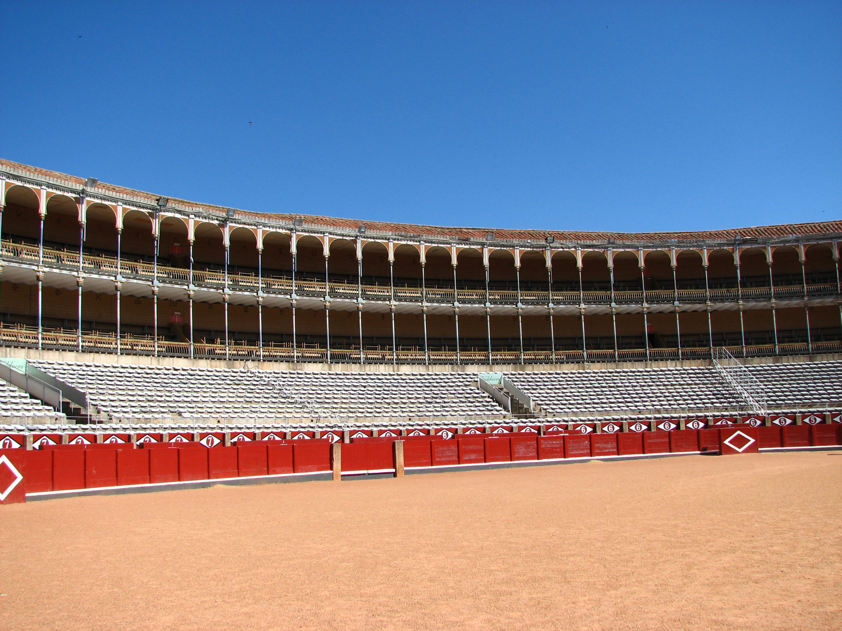 Ruedo. La plaza de toros de Salamanca es de 2º categoría, situada entre la carretera de Fuentesaúco y la carretera de Valladolid. Inaugurada en 1893. Tiene un aforo de 11.800 localidades. Celebra la feria taurina del 8 al 21 de septiembre en honor a la Virgen de la Vega